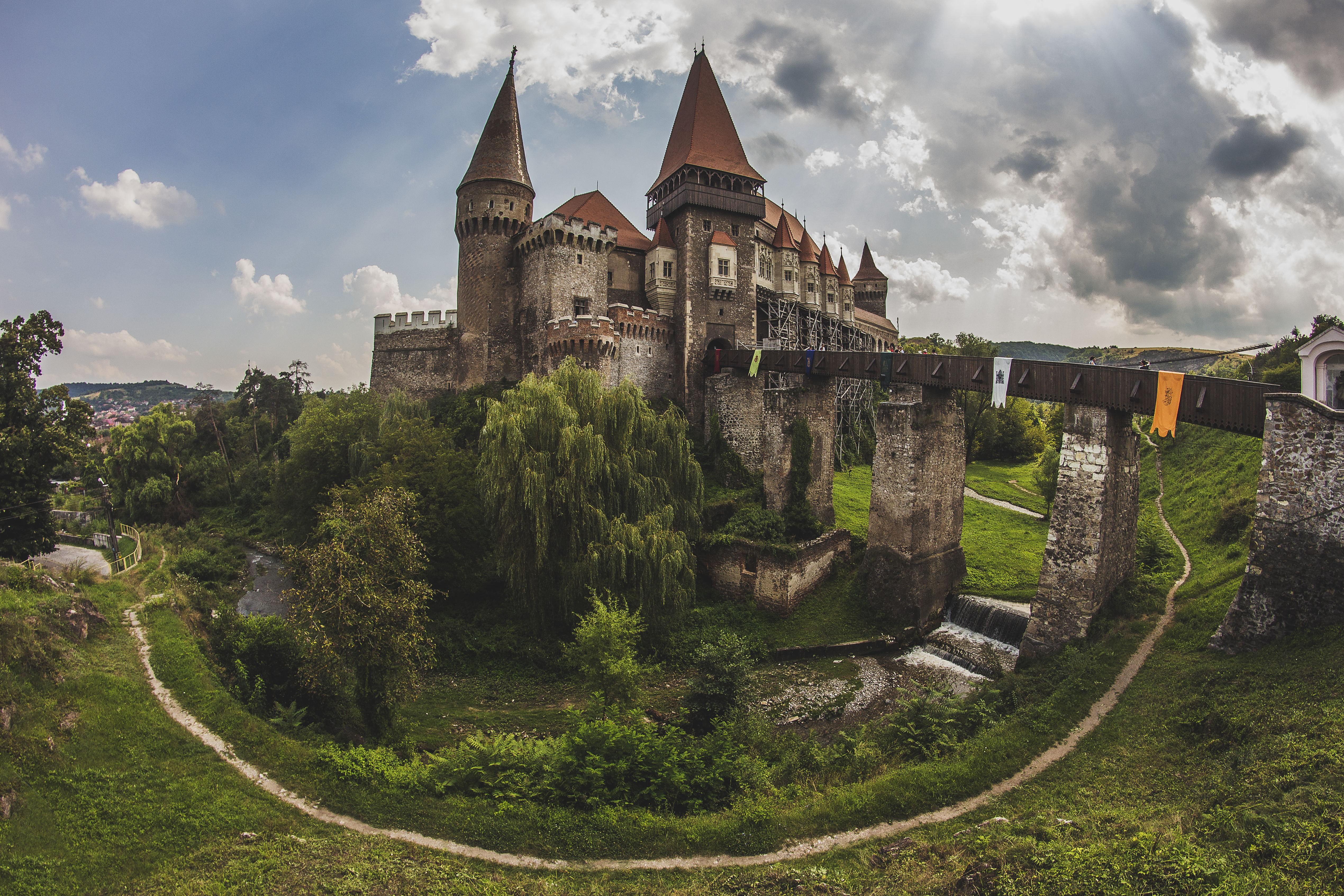 Castelul Corvinilor este cetatea medievală a Hunedoarei, unul din cele mai importante monumente de arhitectură gotică din România.